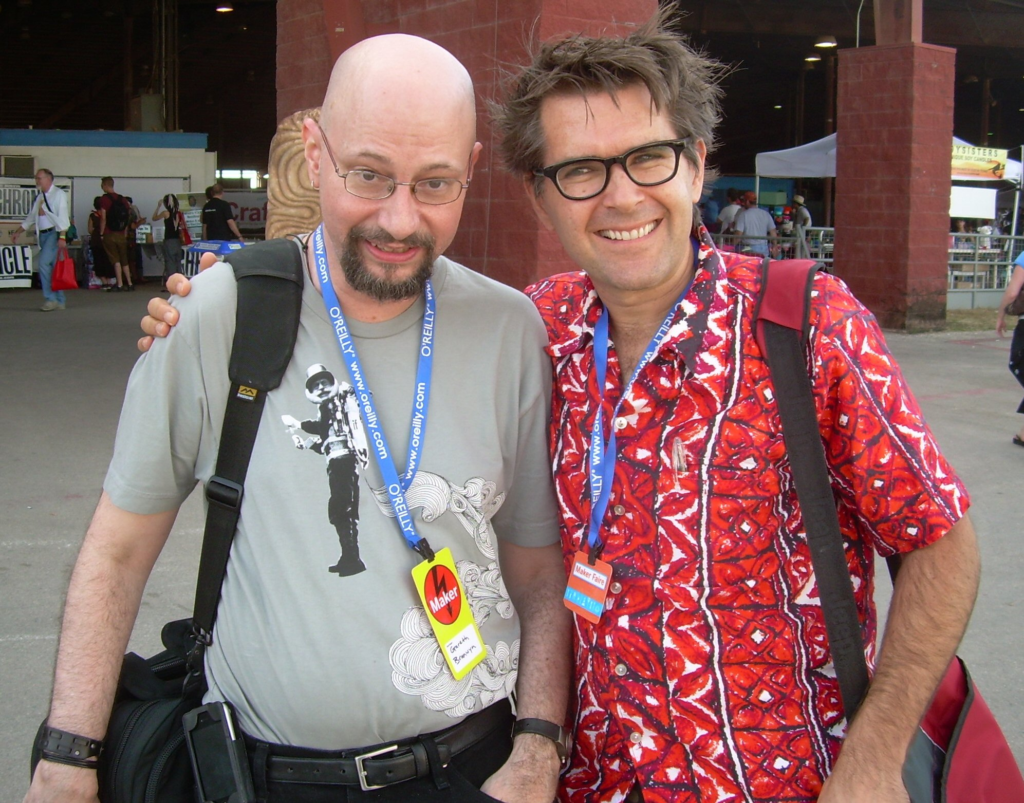 Mark Frauenfelder, Gareth Branwyn and I had a boing boing reunion.